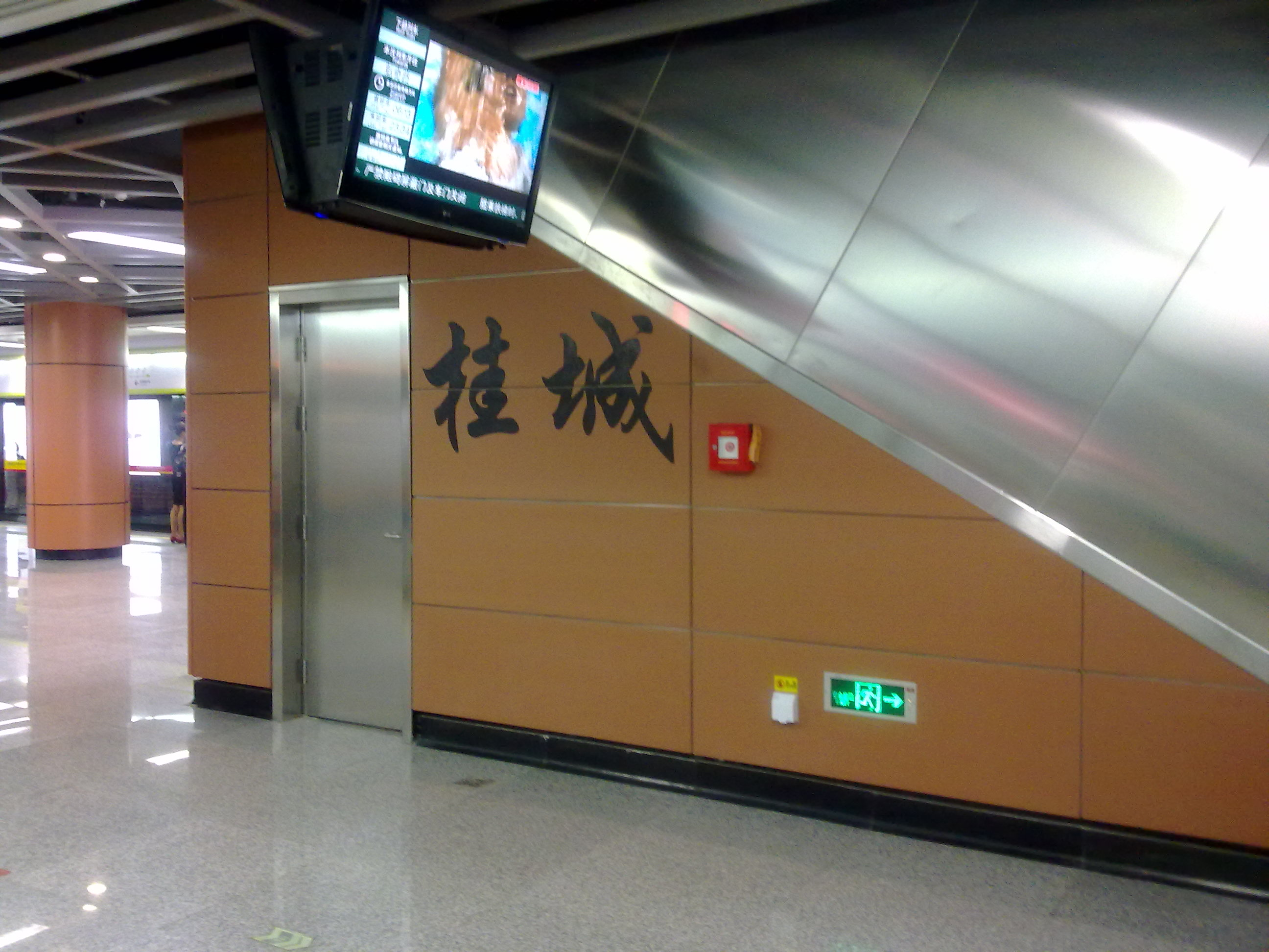 廣佛地鐵桂城站站台